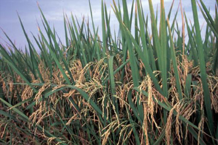 Cosecha de arroz